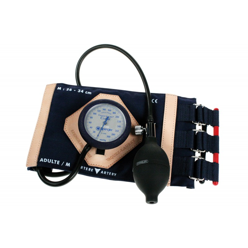 Tnesiometre Vaquez Laubry Classic Brassard